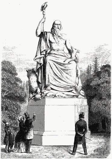 "Le Géant des Alpes, statue par M. Sapey [sic], sculpteur". Statue de 5 m de hauteur, commandée par M. de Saint-Ferriol, possesseur des eaux d'Uriage. Sculpture en ciment de la Porte de France.